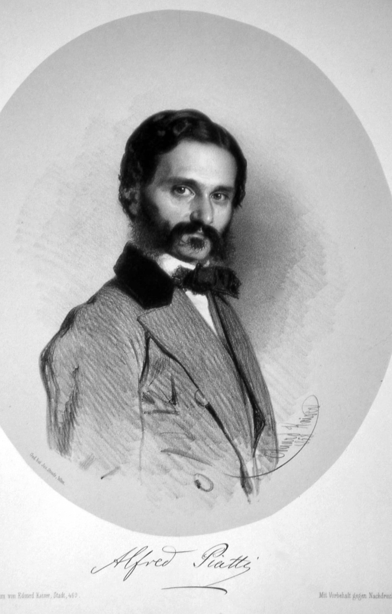 Alfred Piatti (1822-1901), italienischer Cellist und Komponist, Lithographie von Eduard Kaiser, um 1858